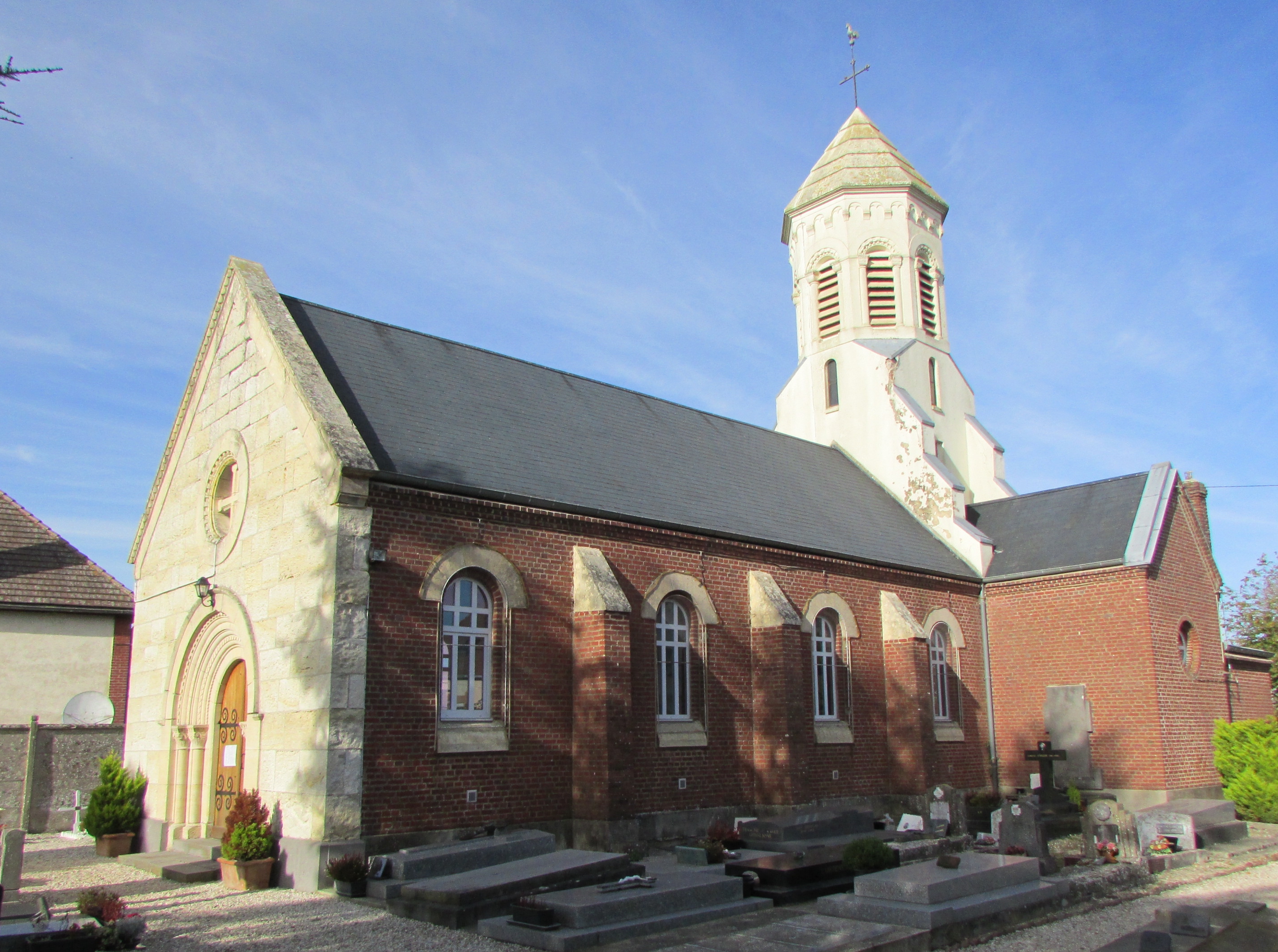 L'église.